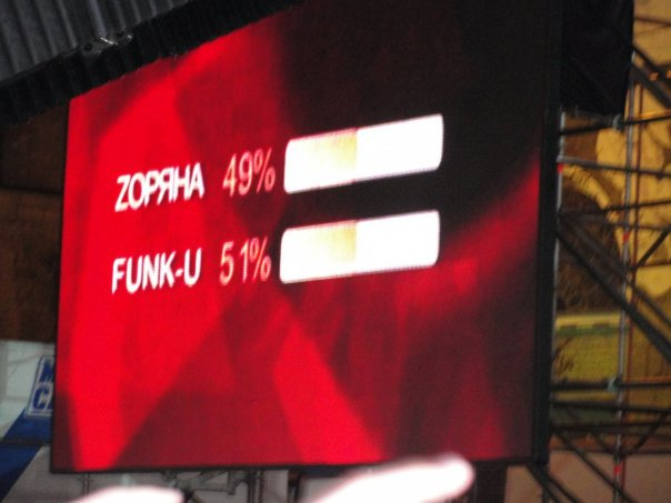 Фінальний рахунок конкурсу Свіжа кров